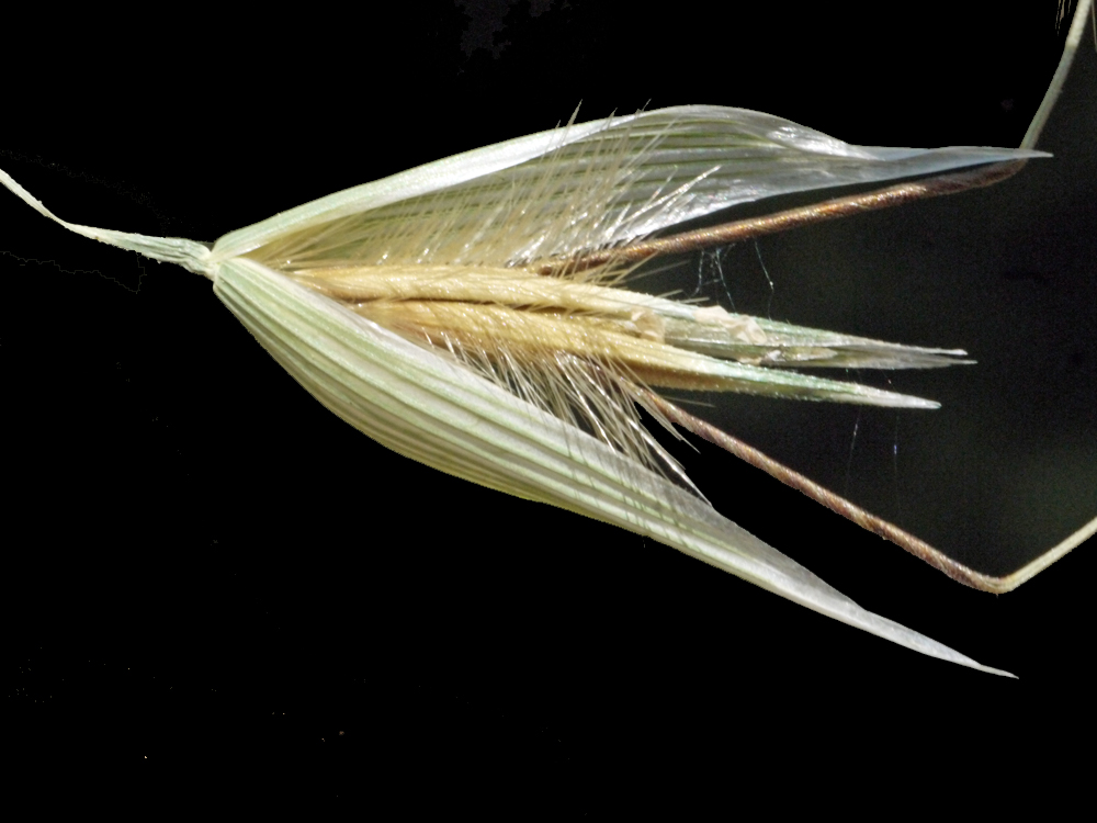 Avena sterilis spikelet